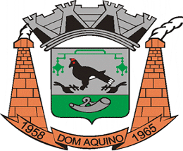 Brasão_Dom_Aquino_MT.gif